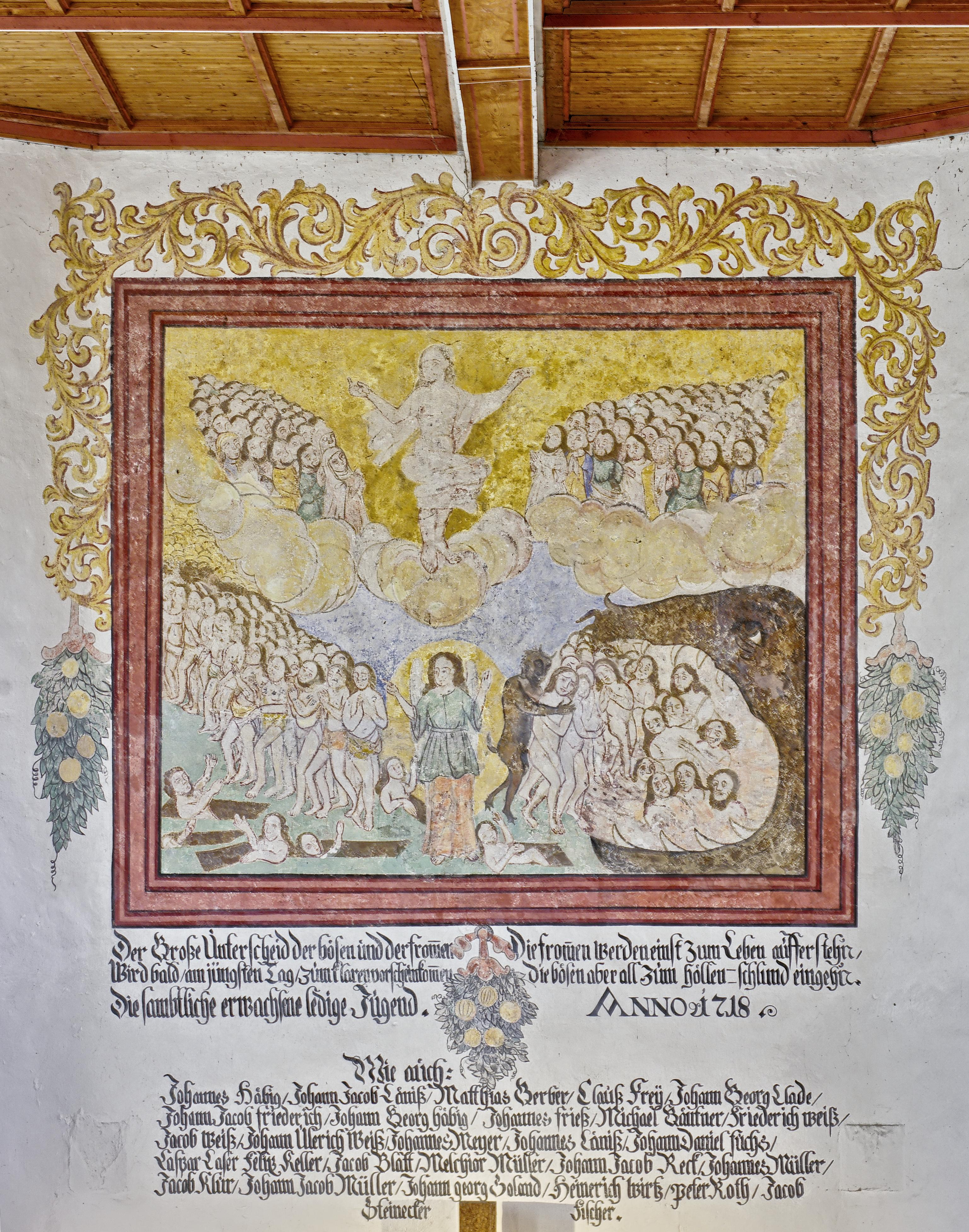 Bergkirche Nimburg, Innenansichten